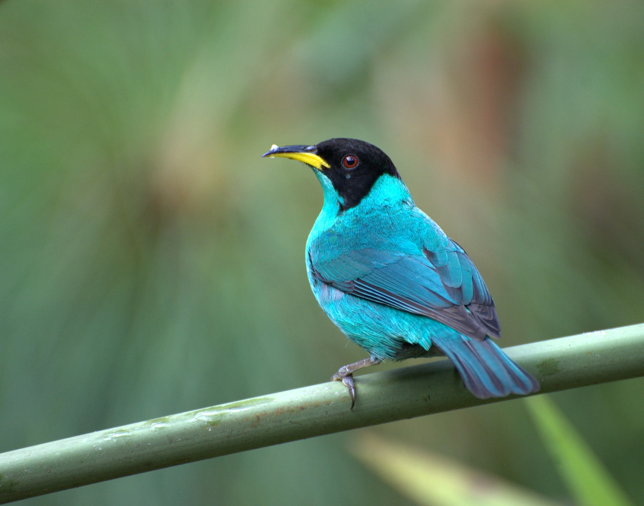 Folha Seca - Ubatuba-SP - Brasil